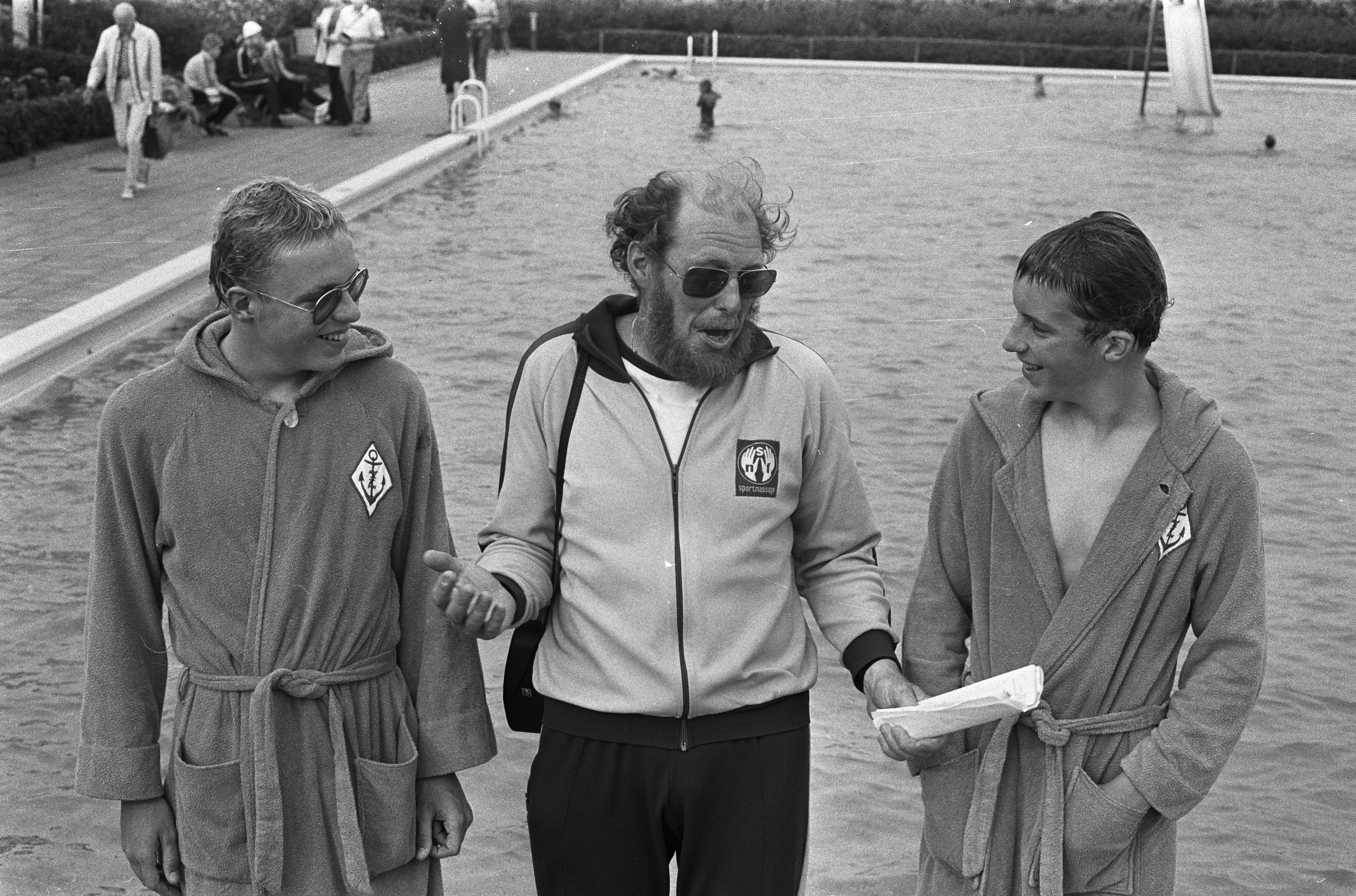 Collectie / Archief : Fotocollectie Anefo Reportage / Serie : [ onbekend ] Beschrijving : Nederlandse Zwemkampioenschappen te Meppel, Robin Woutering (links), vader Woutering en Ronald Woutering Datum : 14 juli 1973 Locatie : Meppel Trefwoorden : sport, zwemmen Persoonsnaam : Woutering Robin, Woutering Ronald Fotograaf : Verhoeff, Bert / Anefo Auteursrechthebbende : Nationaal Archief Materiaalsoort : Negatief (zwart/wit) Nummer archiefinventaris : bekijk toegang 2.24.01.05 Bestanddeelnummer : 926-5464